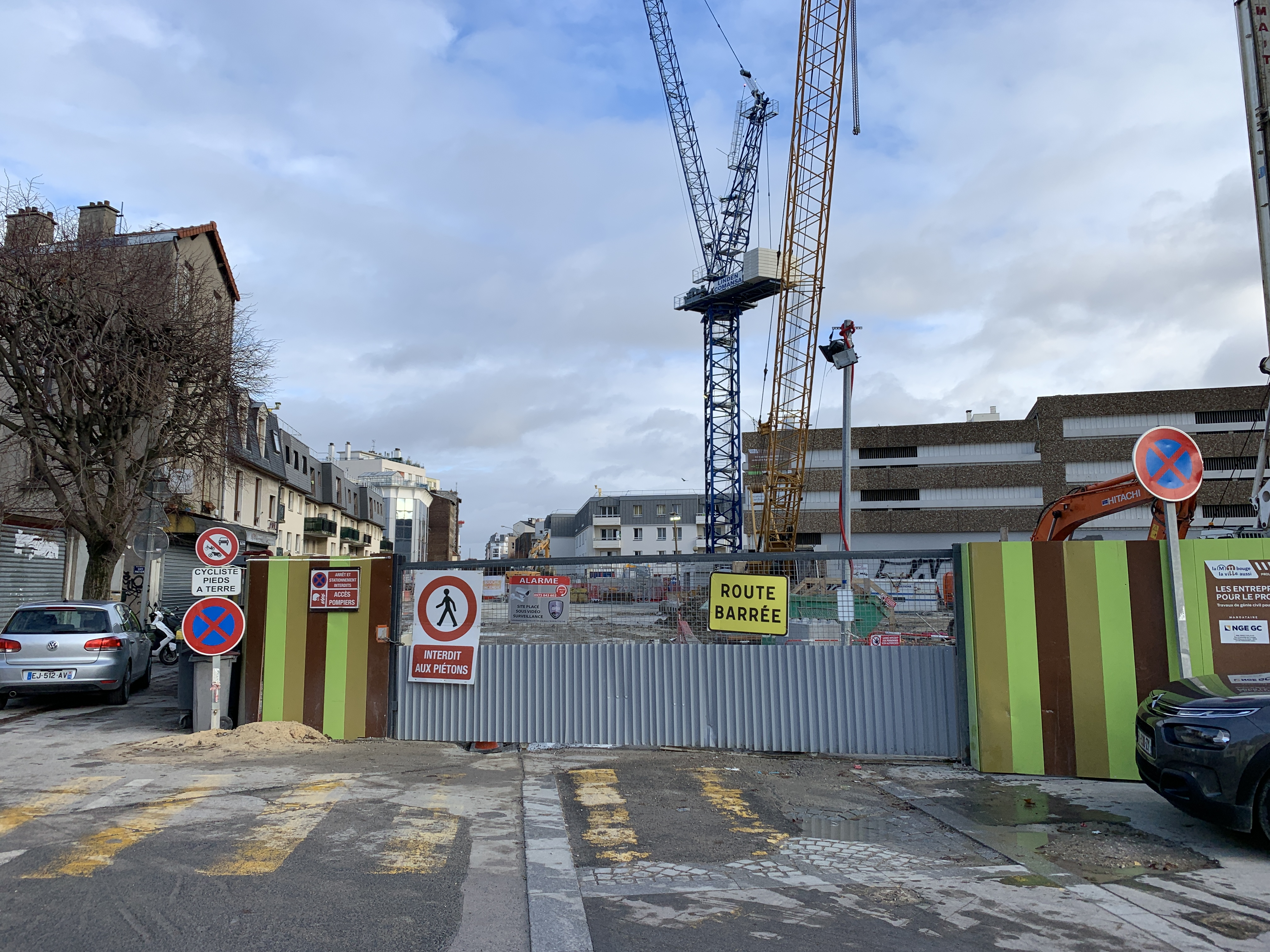 Chantier de la station de métro Serge Gainsbourg sur la ligne 11, Les Lilas.